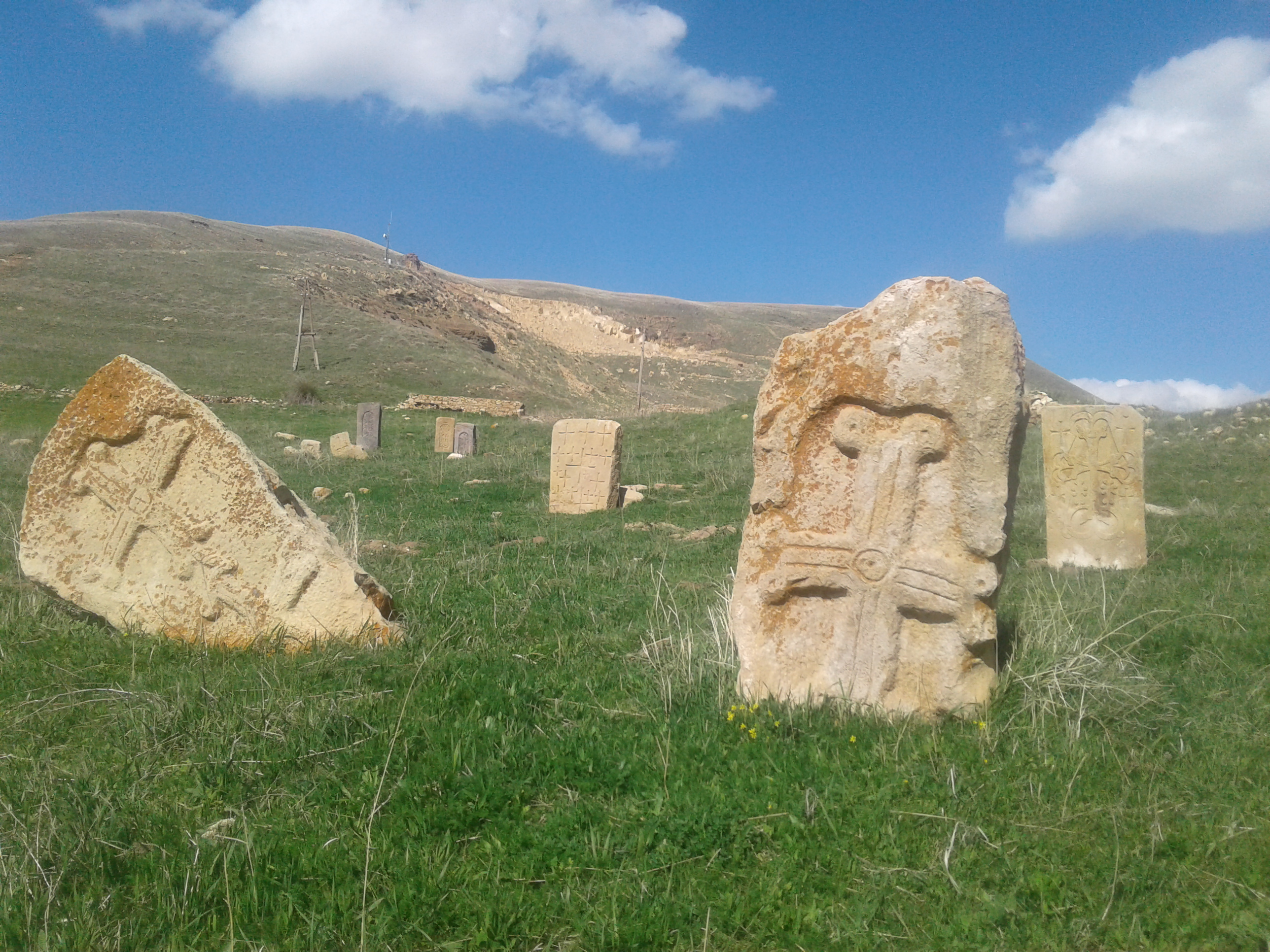 Հավասարաթև խաչքարեր Գնիշիկում